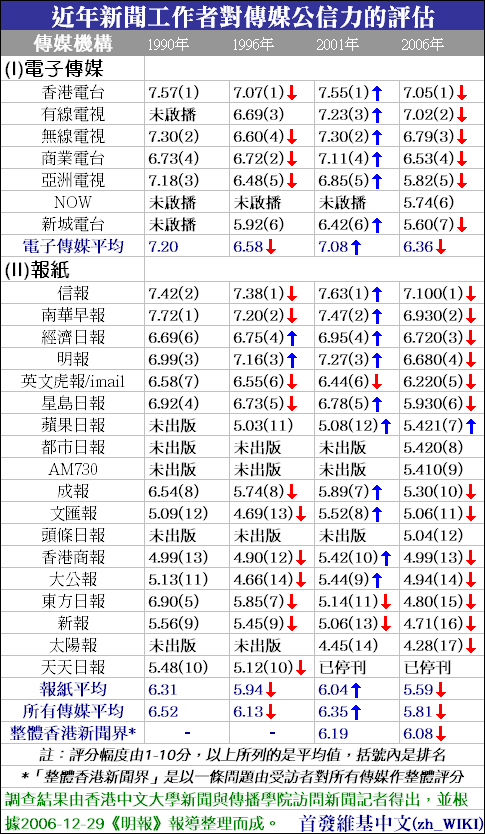 香港傳媒公信力評估。調查結果由香港中文大學新聞與傳播學院訪問新聞記者得出，並根據2006-12-29《明報》報導整理而成。